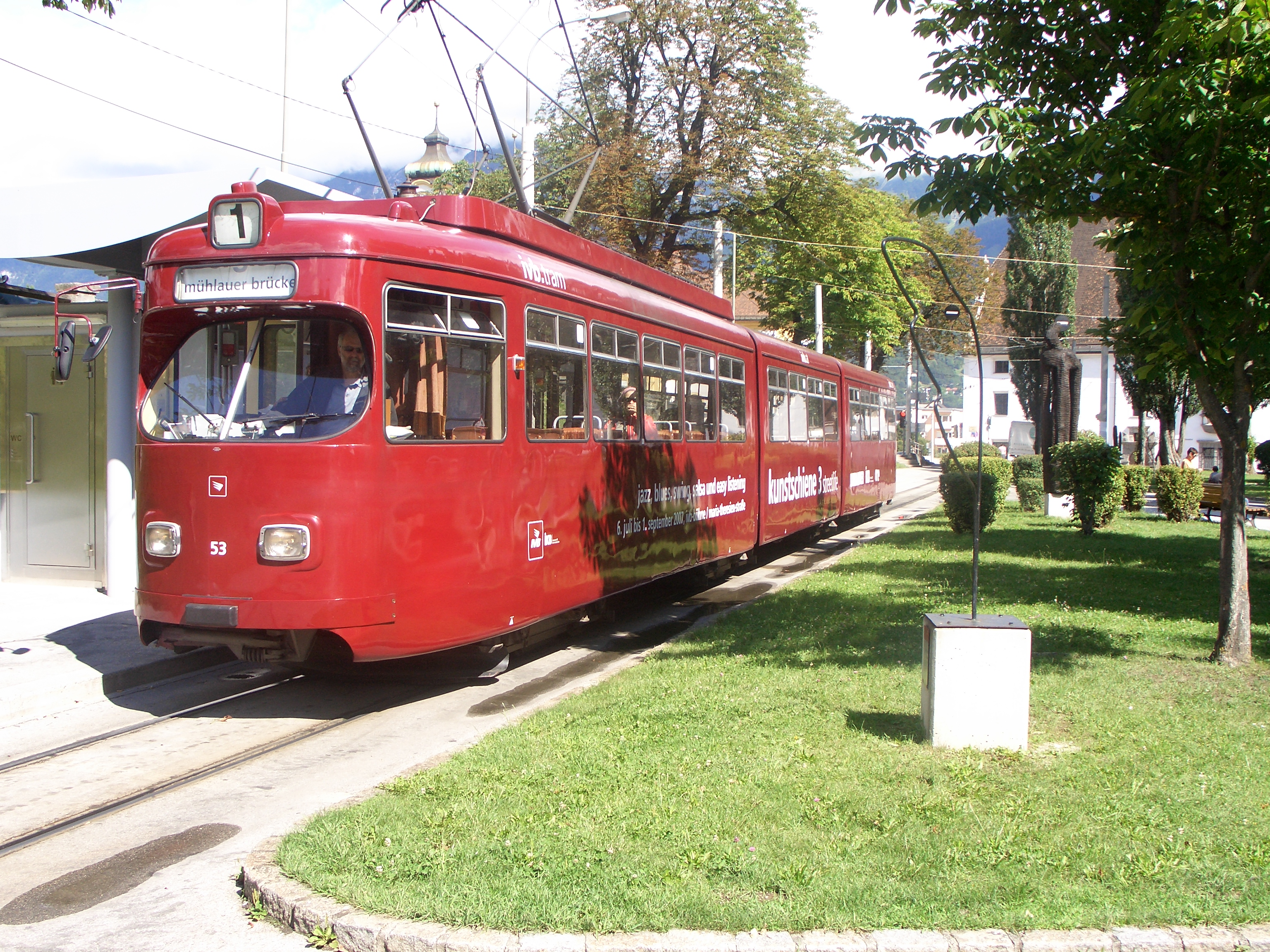 TW 53, Innsbrucker Straßenbahn, ex-Bielefeld, 8ax.